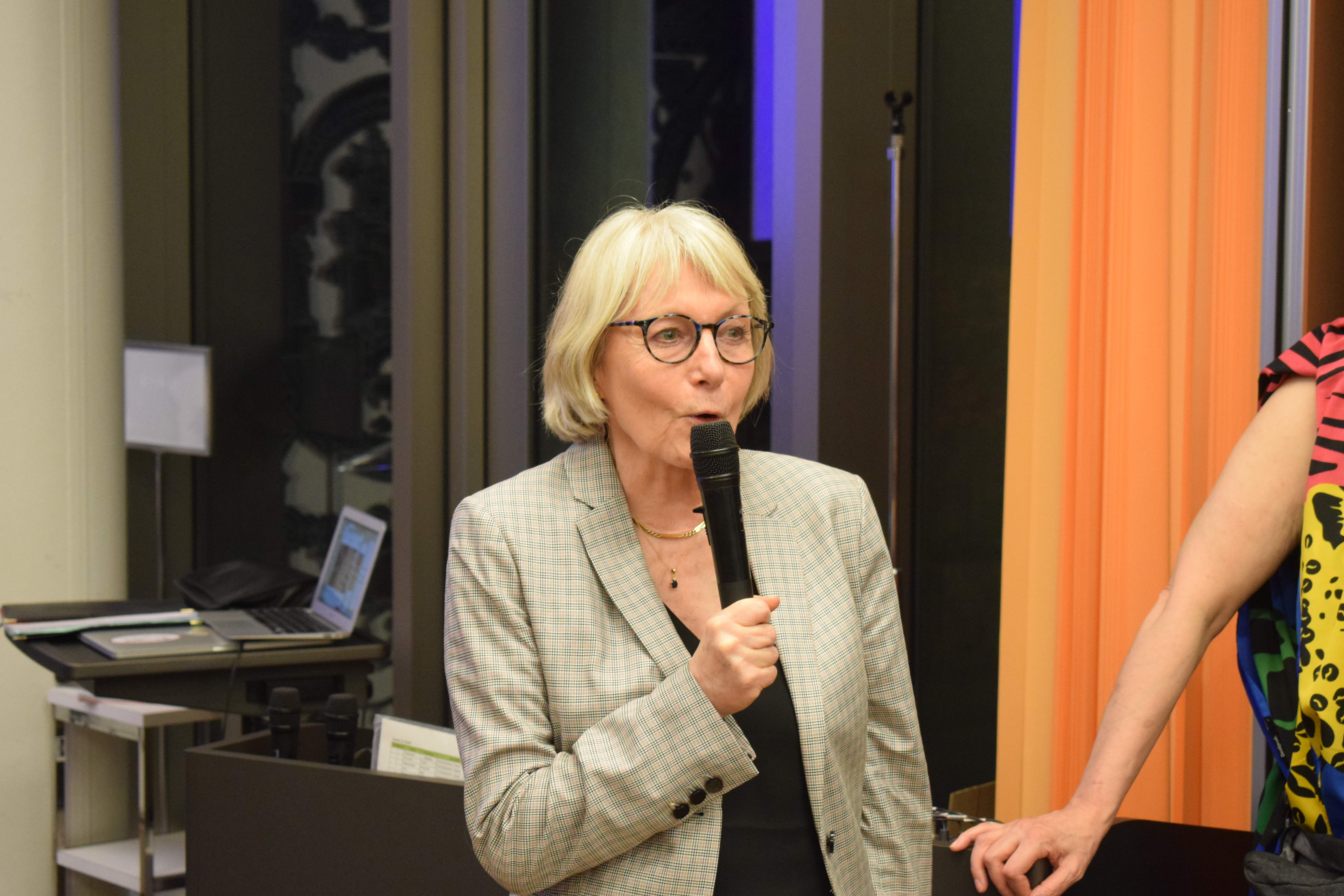 Claudine Lepage, Sénatrice des Français établis hors de France, à l'apéritif de bienvenue organisé par l'association Français du Monde (ADFE Tokyo)